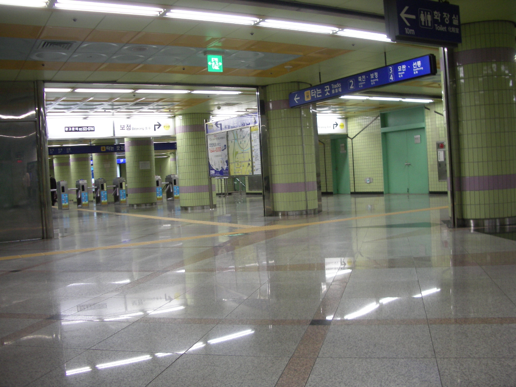 오리역 지하1층 대기실